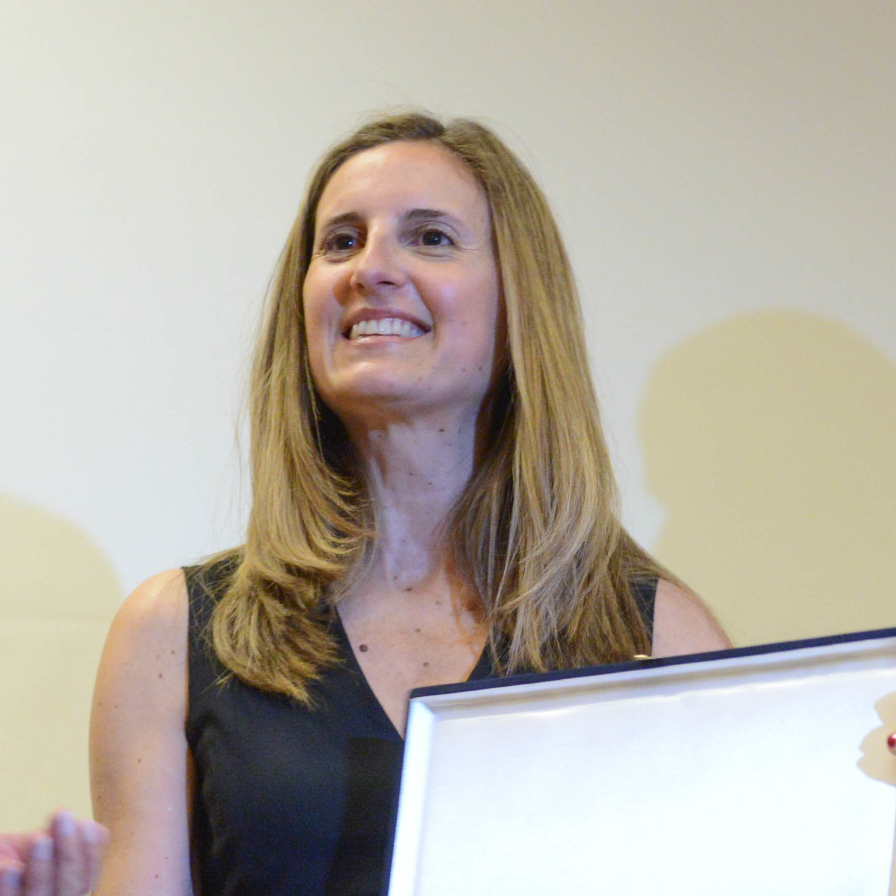 Ministro Elizalde entrega el premio Lenka Franulic a la periodista Paula Escobar